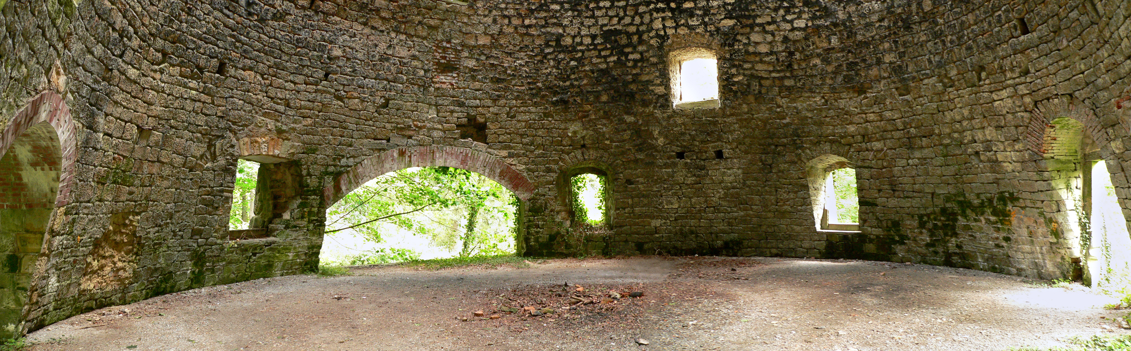 Glassschmelzofen innen in Bredenbeck-Steinkrug